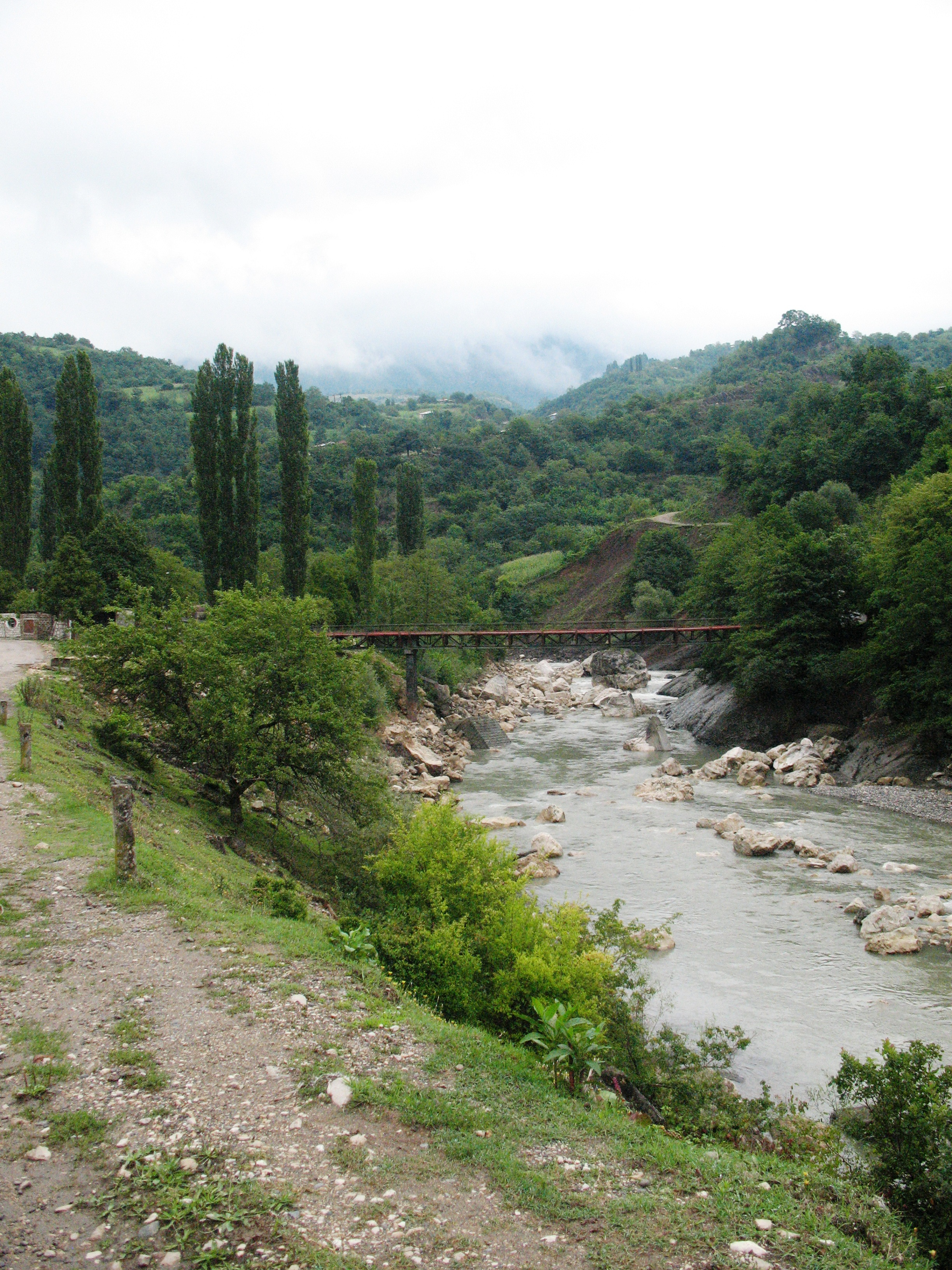 მდინარე ცხენისწყალი